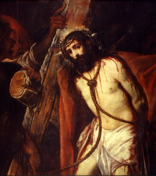 El lienzo representa a Jesucristo de camino al Monte Calvario o Gólgota, donde sería crucificado, y en el momento en que se dísponía a cargar con la cruz, que aparece por detrás de él.